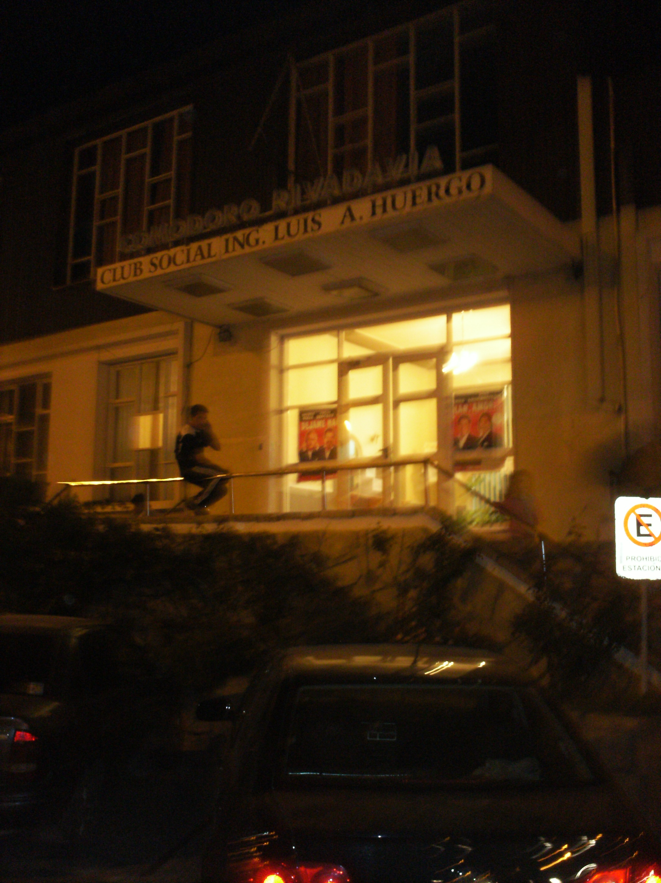 el club social y deportivo huergo en una noche comodorense